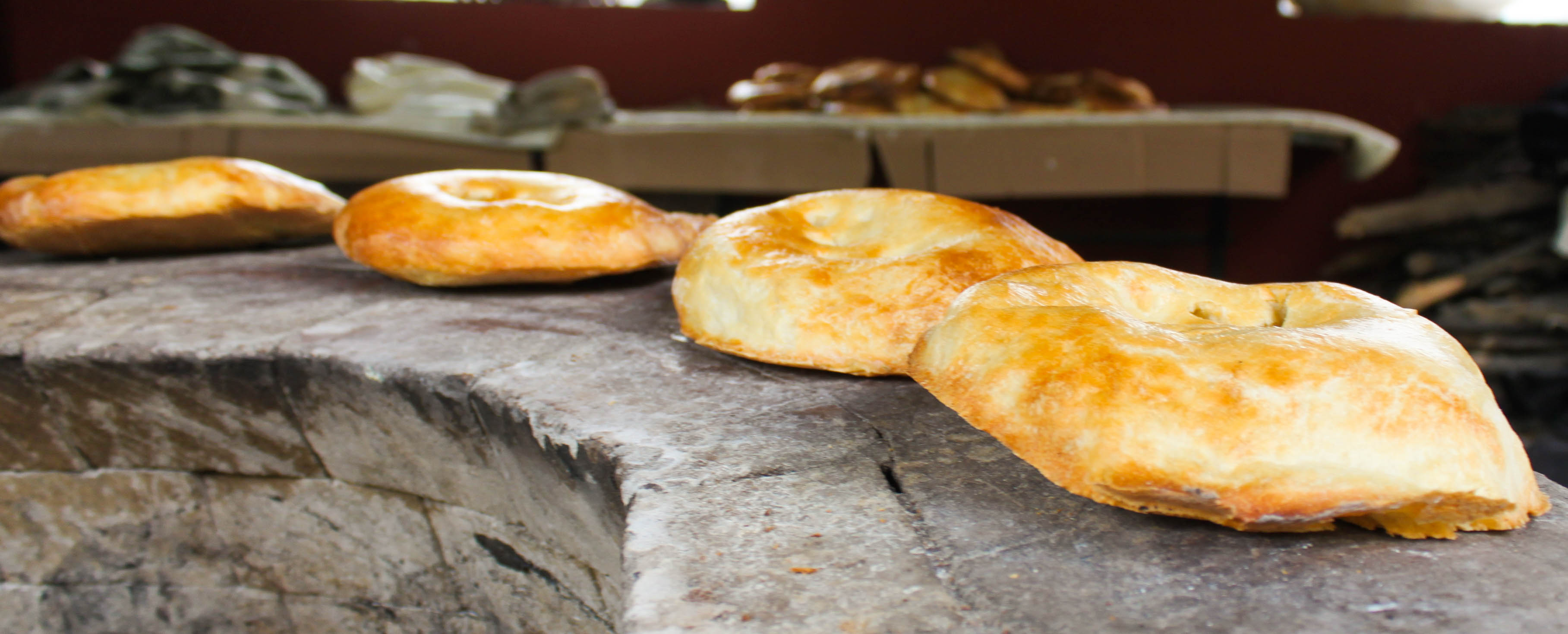 Təndirdən yeni çıxarılmış çörəklər